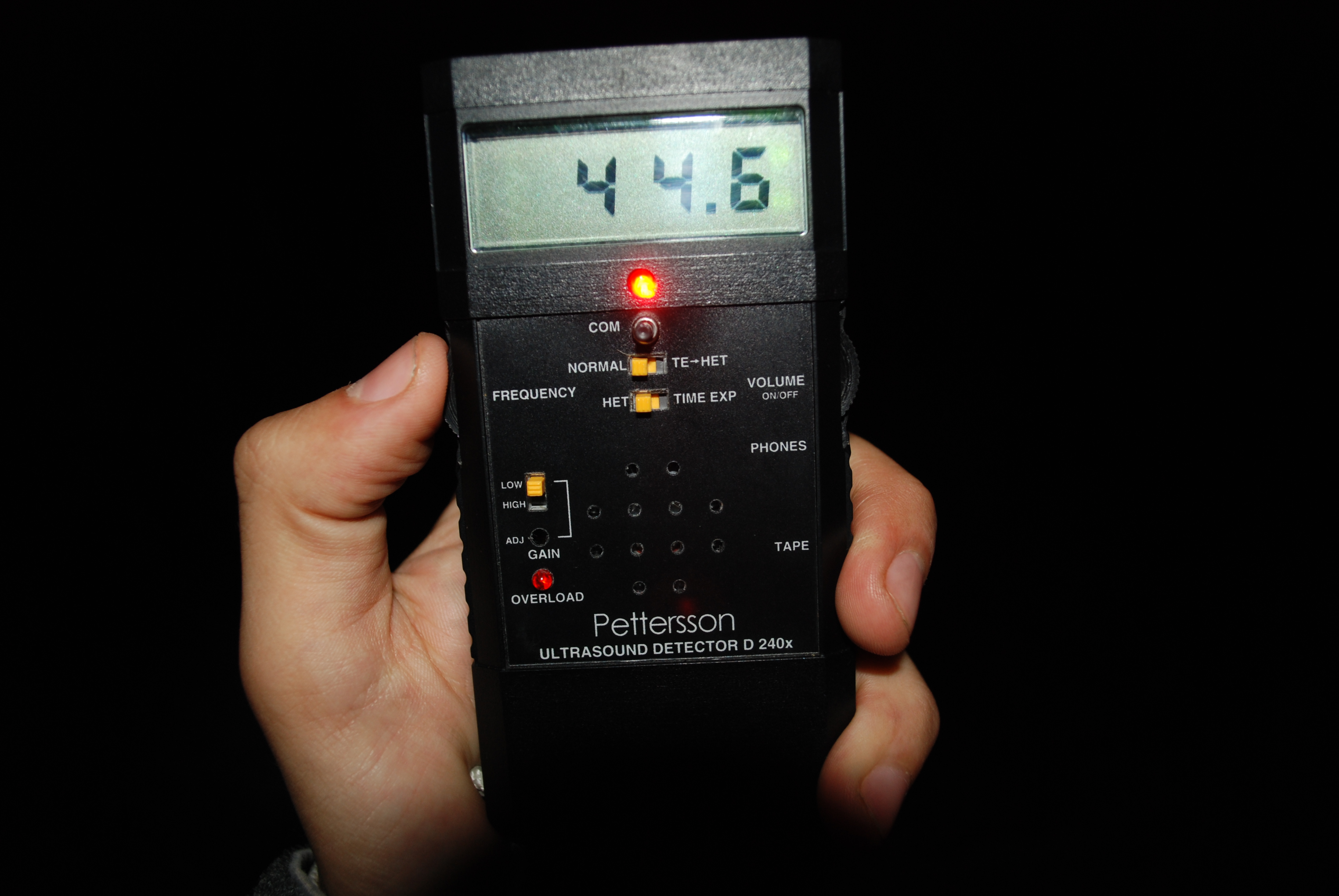 Bat detector